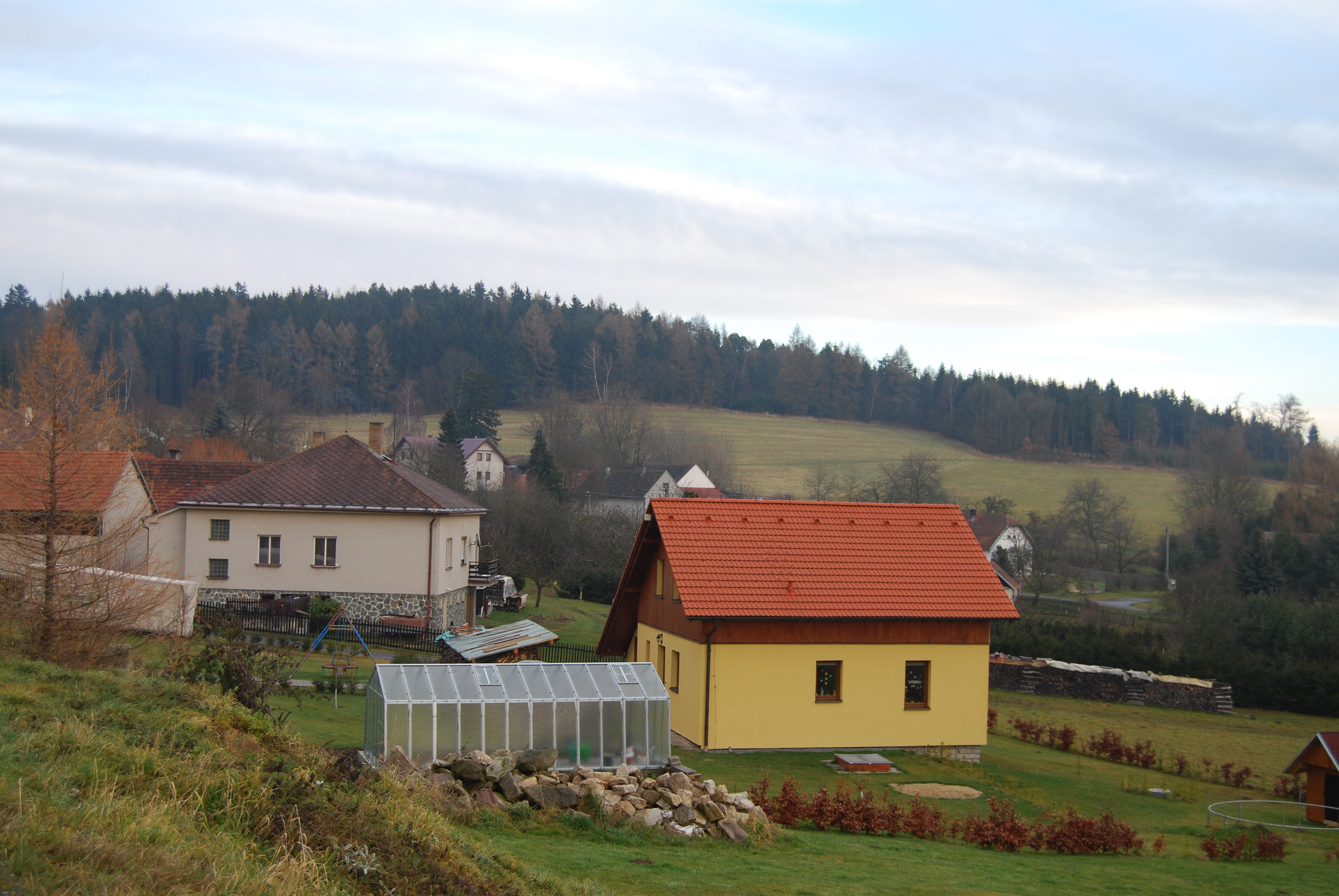 Pohled na část vesnice. Hůrka (Jistebnice). Okres Tábor. Česká republika.